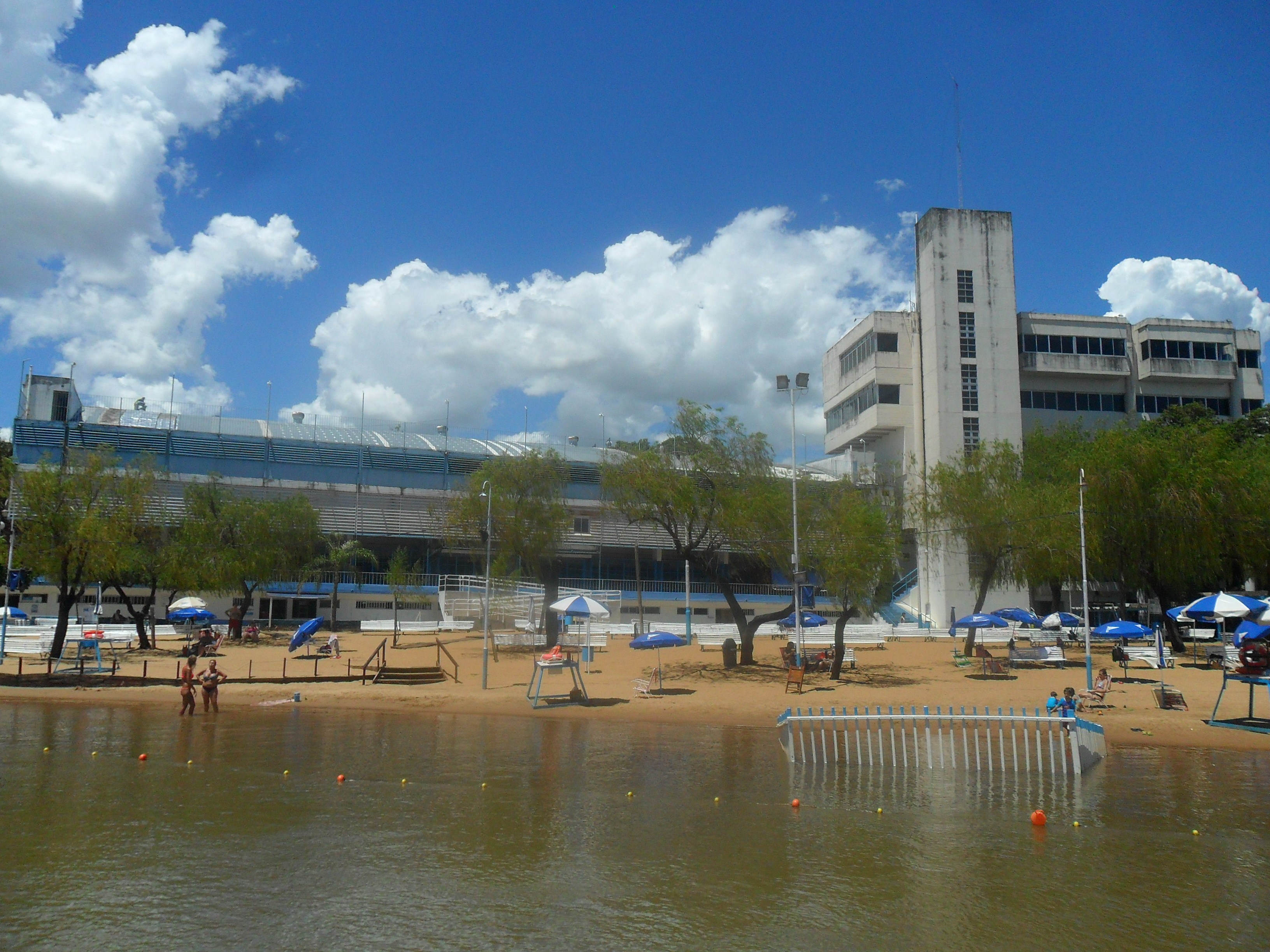 Vista Actual de la Playa del Club Regatas (Febrero de 2018)